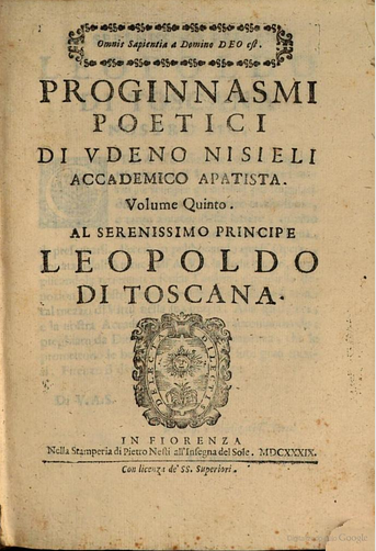 Proginnasmi poetici, 1639, Benedetto Fioretti (1579-1642)